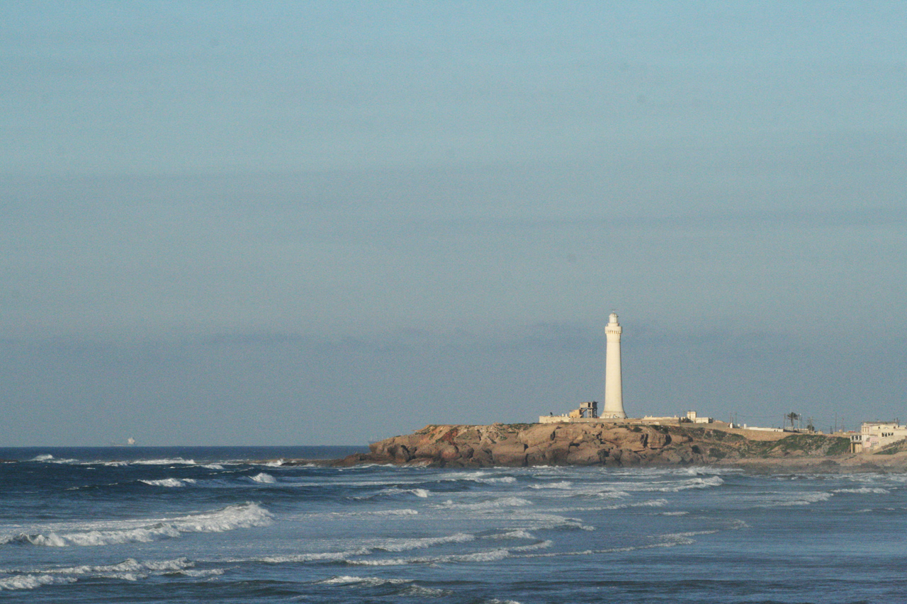 Phare d'El Hank à Casablancca